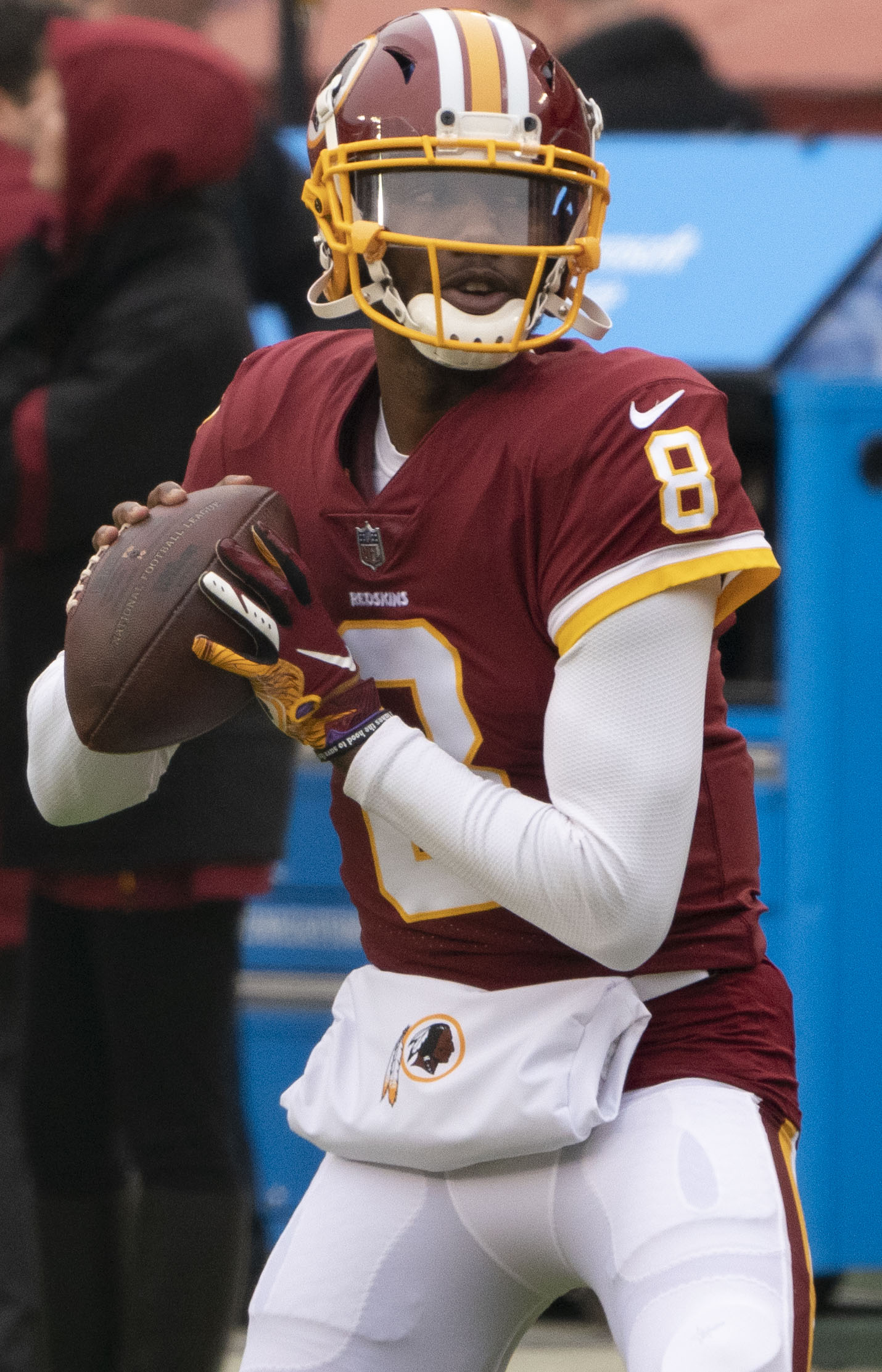 Giants at Redskins 12/09/18